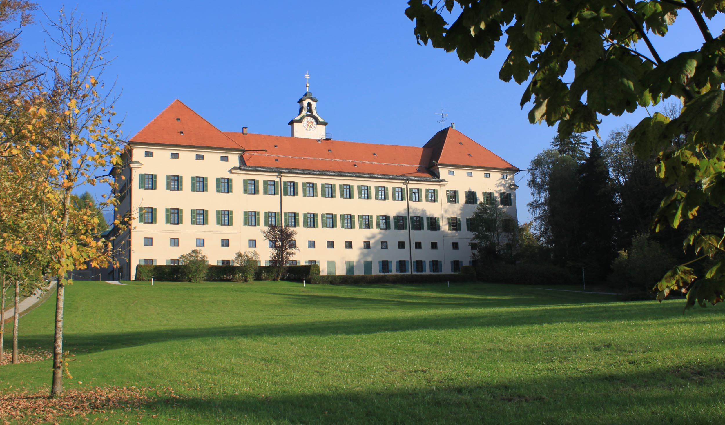 Schloss Hohenburg in Lenggries, Hauptfront im Abendlicht.